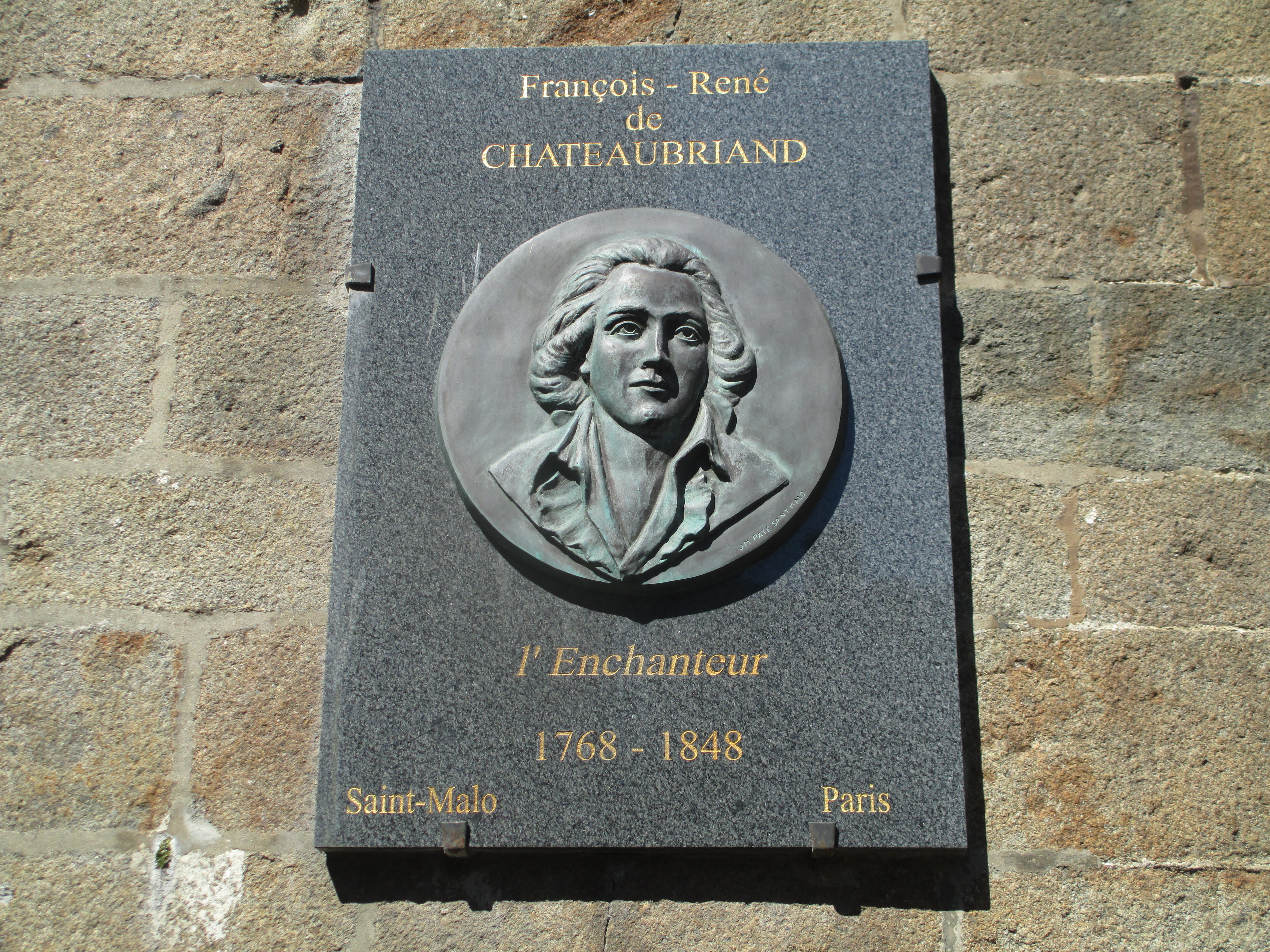 לוחית זיכרון לרנה שטובריאן בסן מאלו